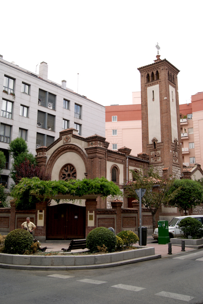 Iglesia de San Jorge